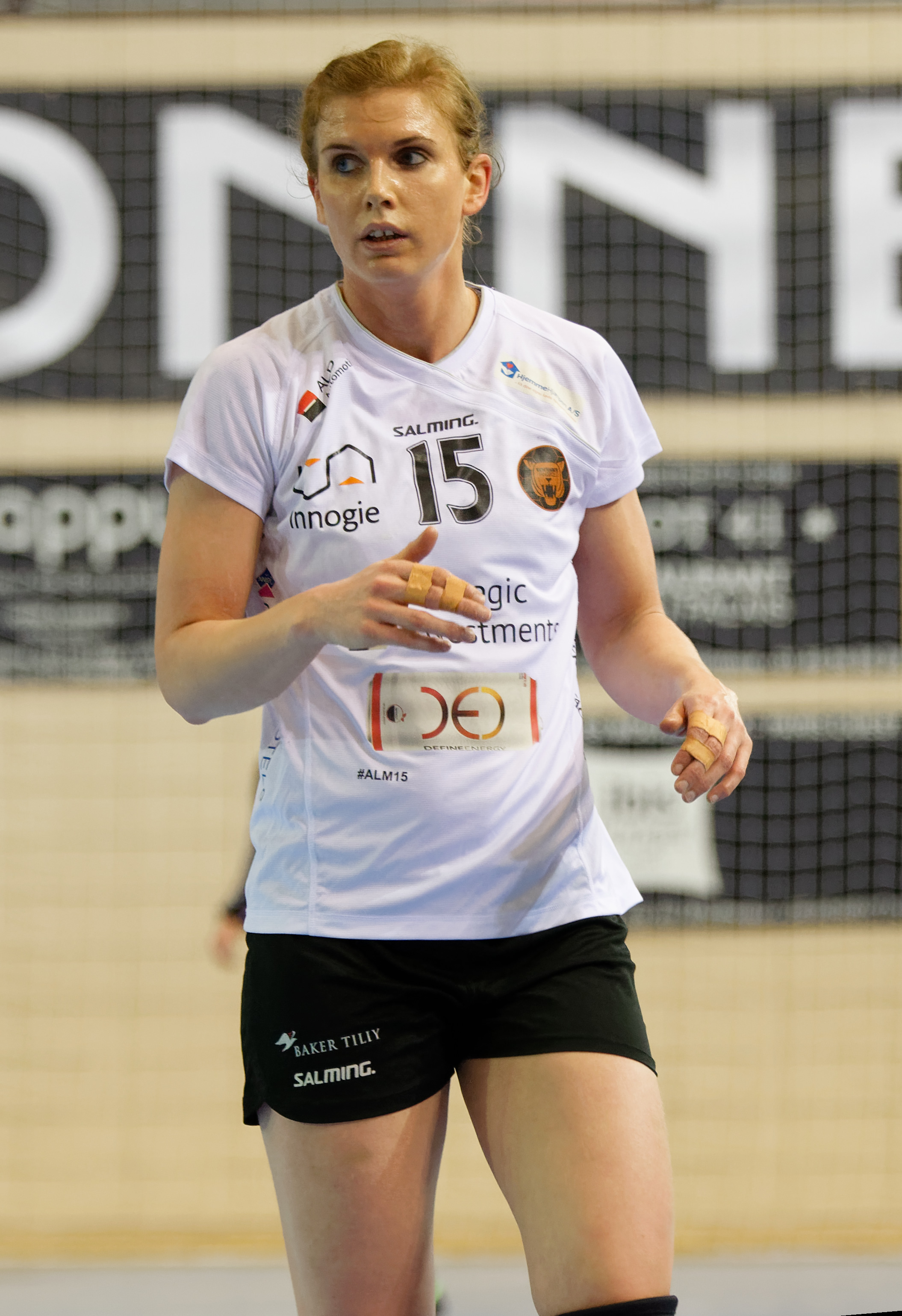 Rencontre du tour principal de la coupe EHF entre Issy Paris Hand et les danoises de Copenhague. A Issy Les Moulineaux, le 28 janvier 2018.